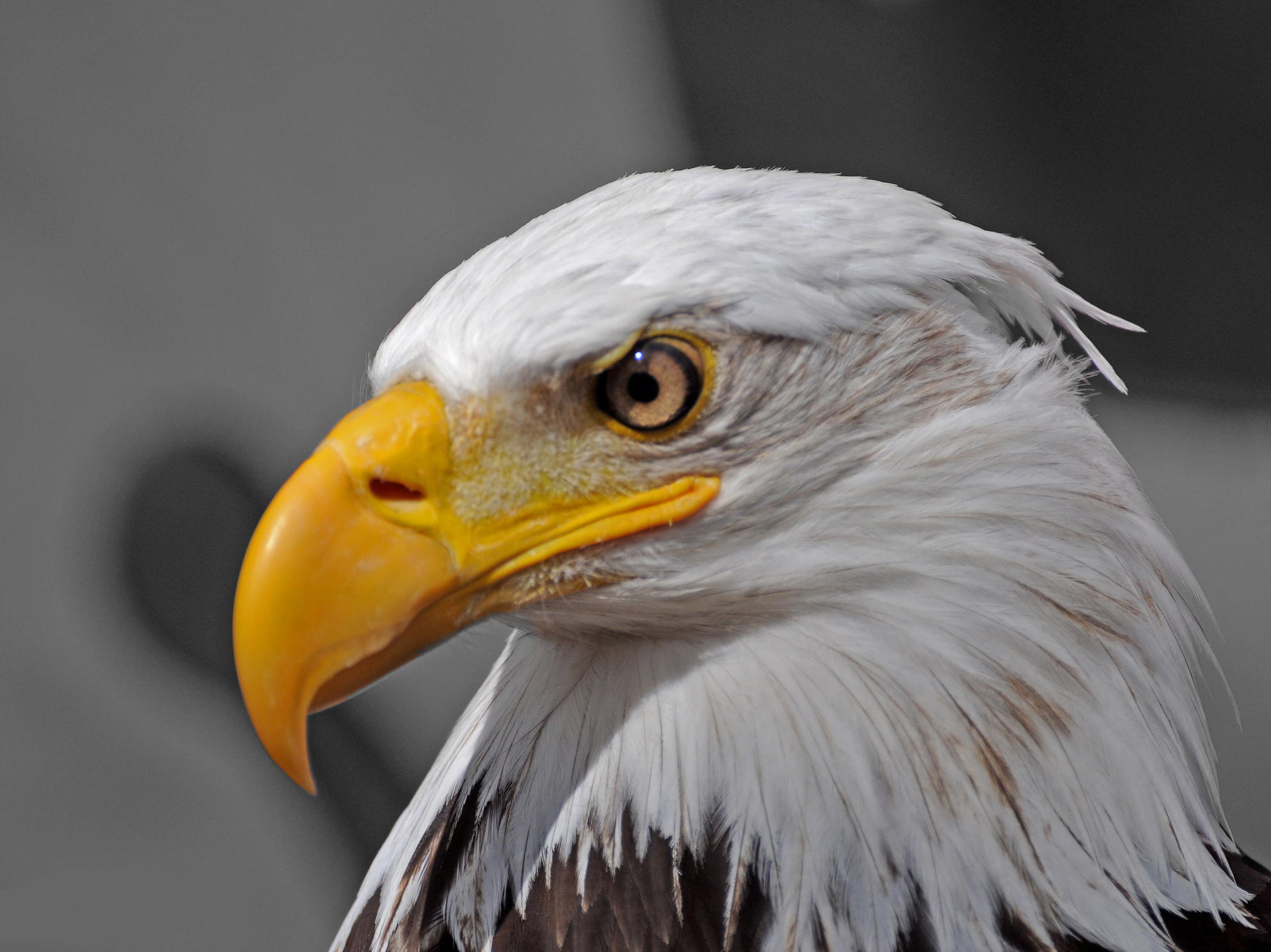 Impresionante, No había visto un aguila tan de cerca, y la verdad es que acoj... Esta en concreto es Vitoria, la que vuela sobre el estadio del Benfica antes de cada partido.